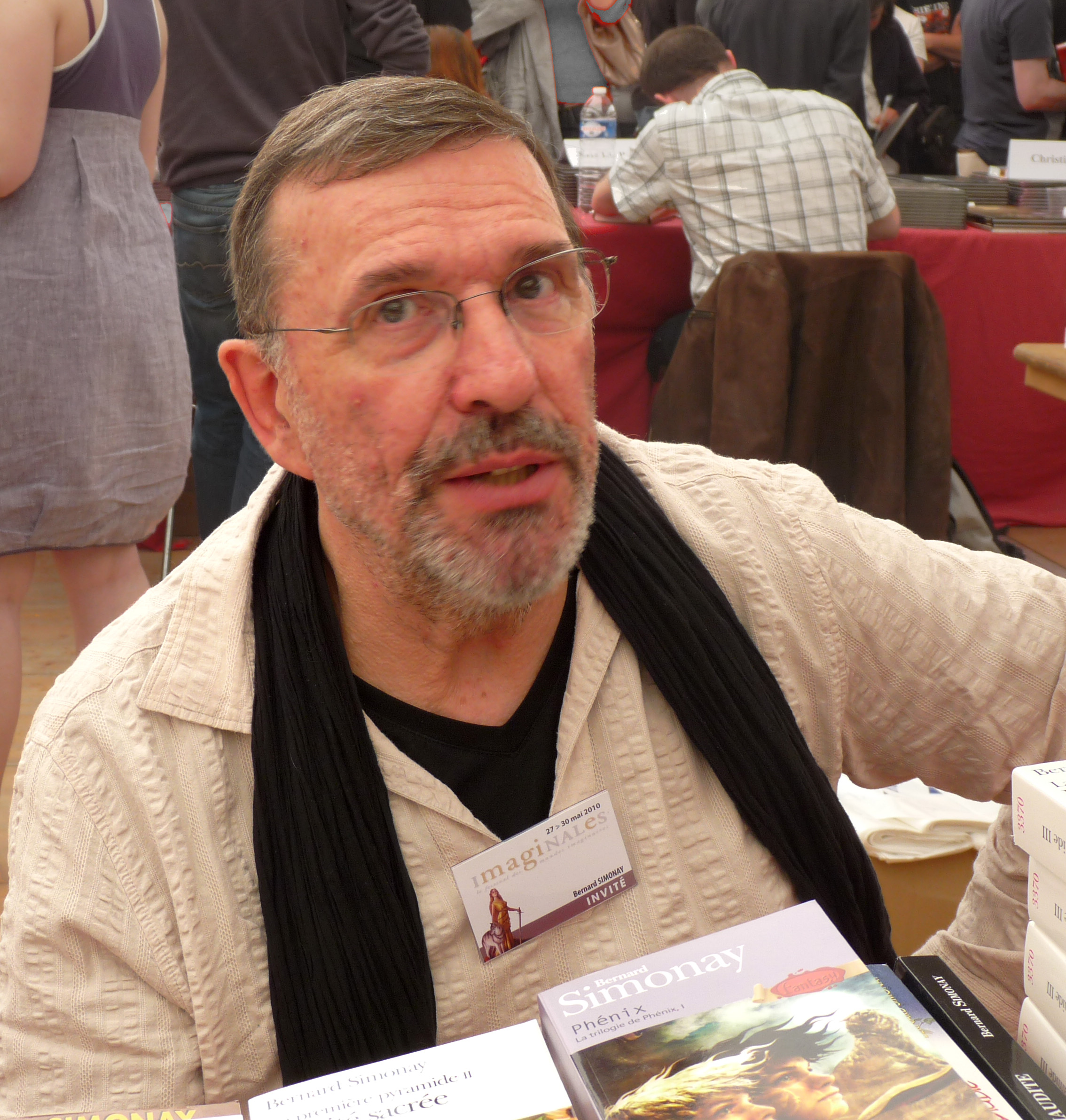 L'écrivain Bernard Simonay (Imaginales 2010, Epinal)